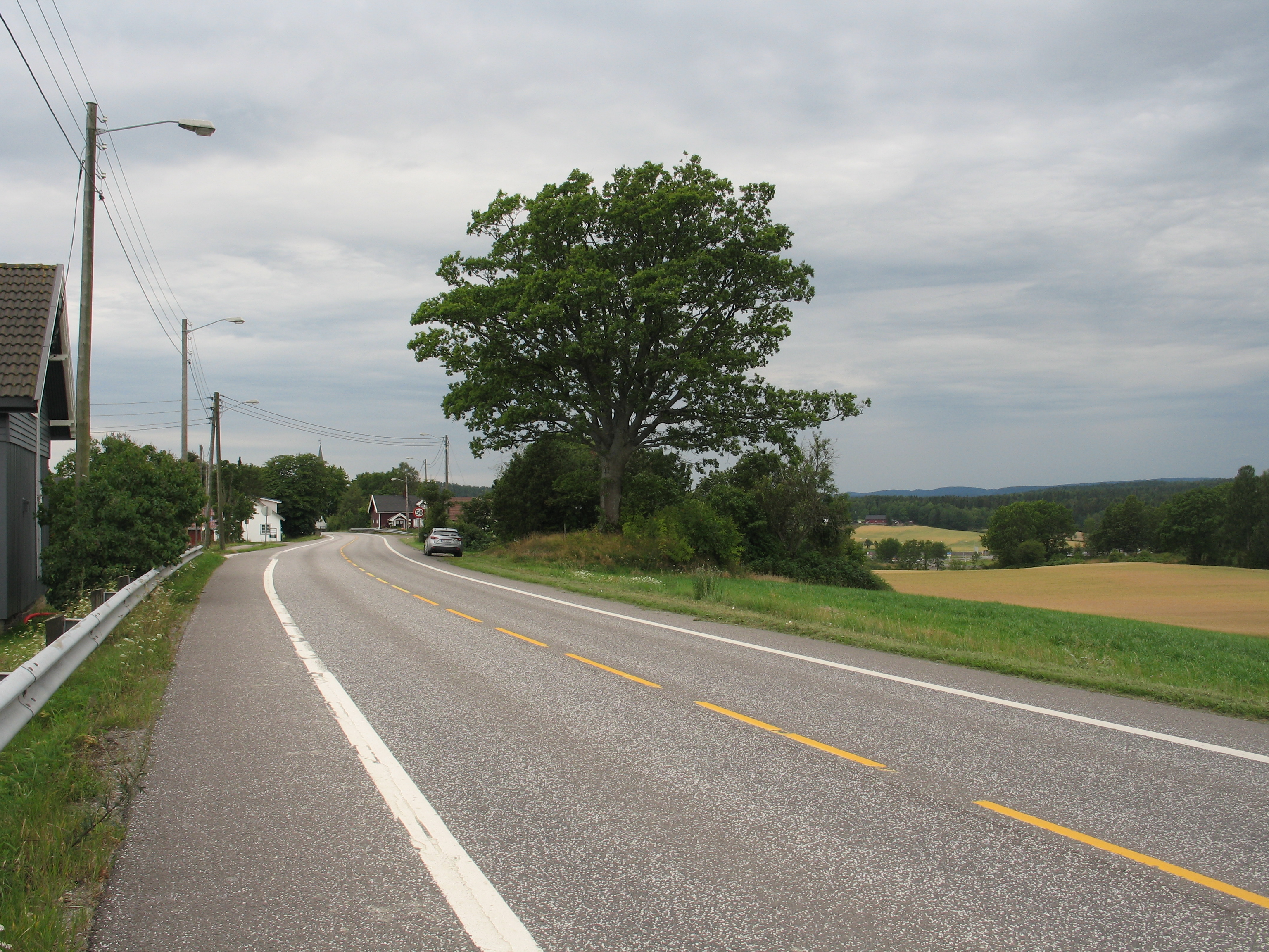 Raveien, som her heter Semsbyveien, i Vestfold ved Skjee. Kulturminne med Lokalitets ID: 23709 sentralt i bildet - dette er gravminne fra jernalder tilhørende gården Ramsum. Veien på raet var også i jernalderen en hovedvei gjennom Vestfold. Semsbyveien 451 i bakgrunnen.